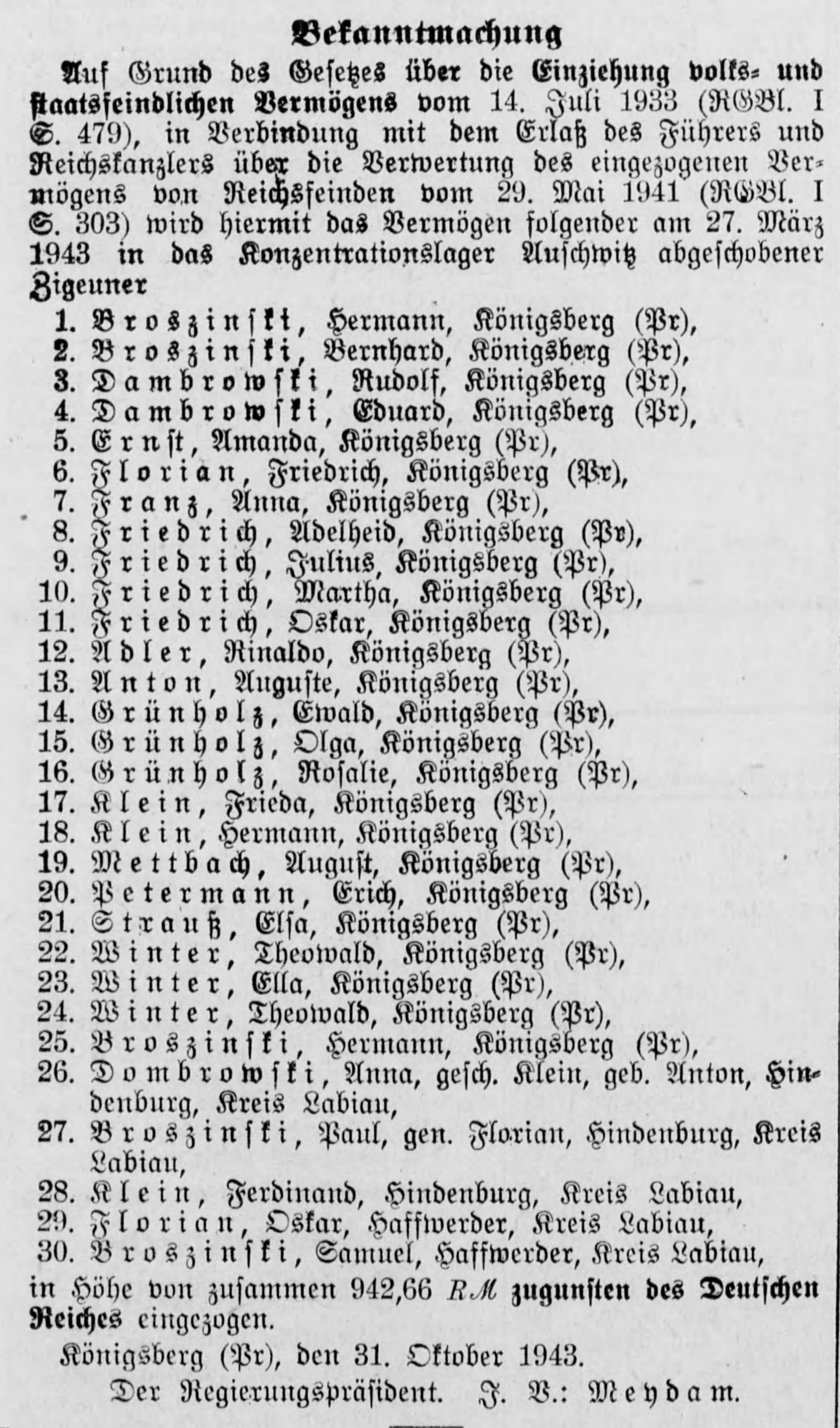 Zeitungsausschnitt über die Enteignung von Häftlingen des Konzentrationslagers Auschwitz